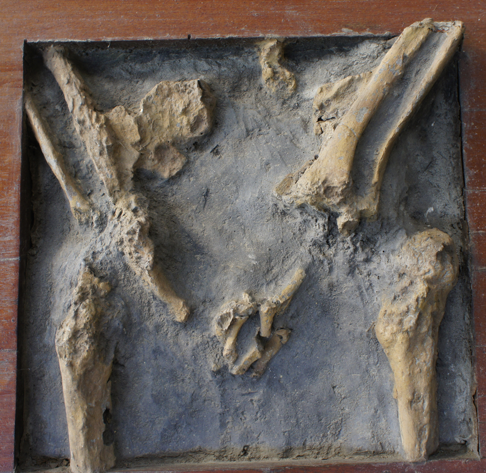 中文（台灣）: 惠來遺址人骨。